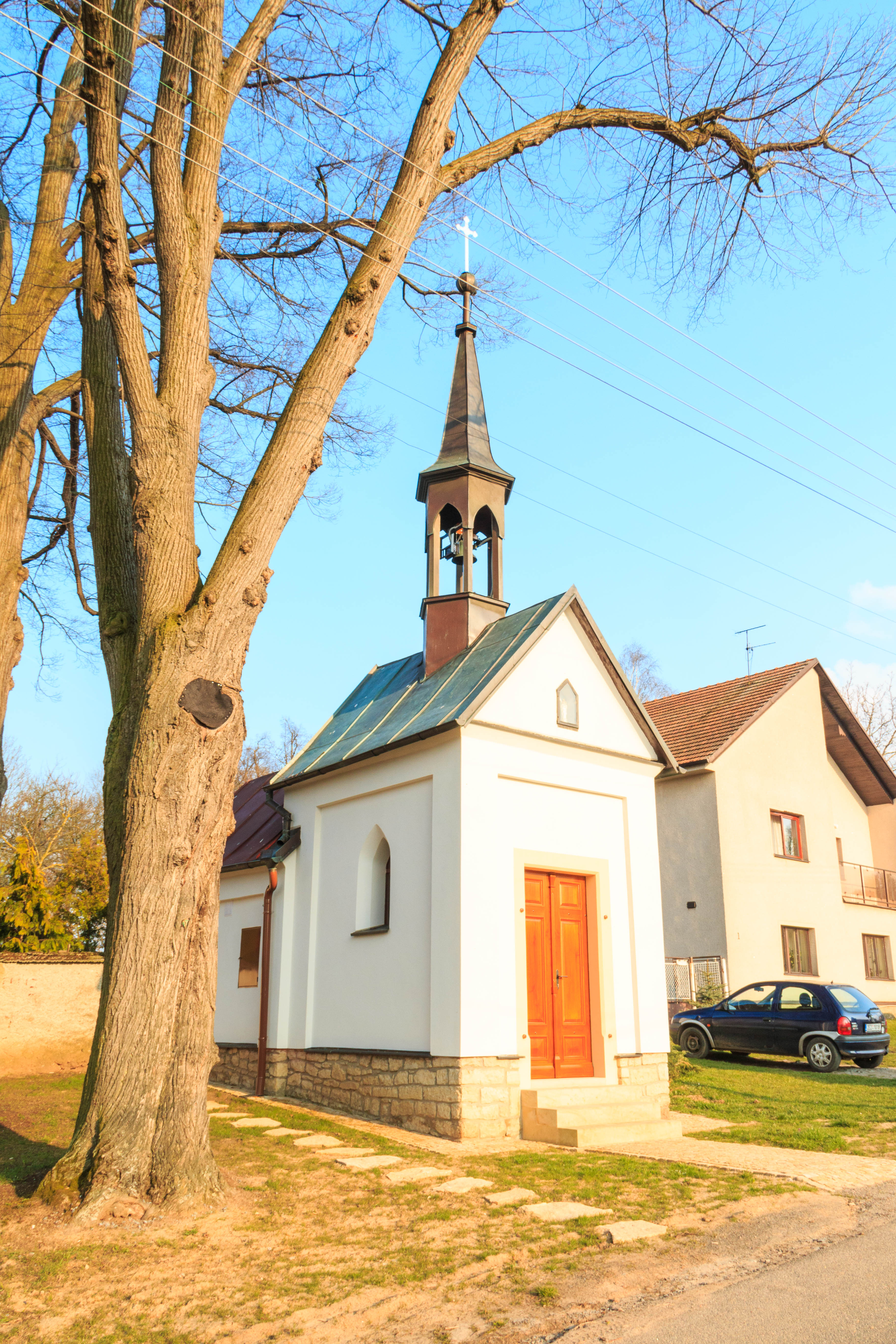 Kvasín kaplička